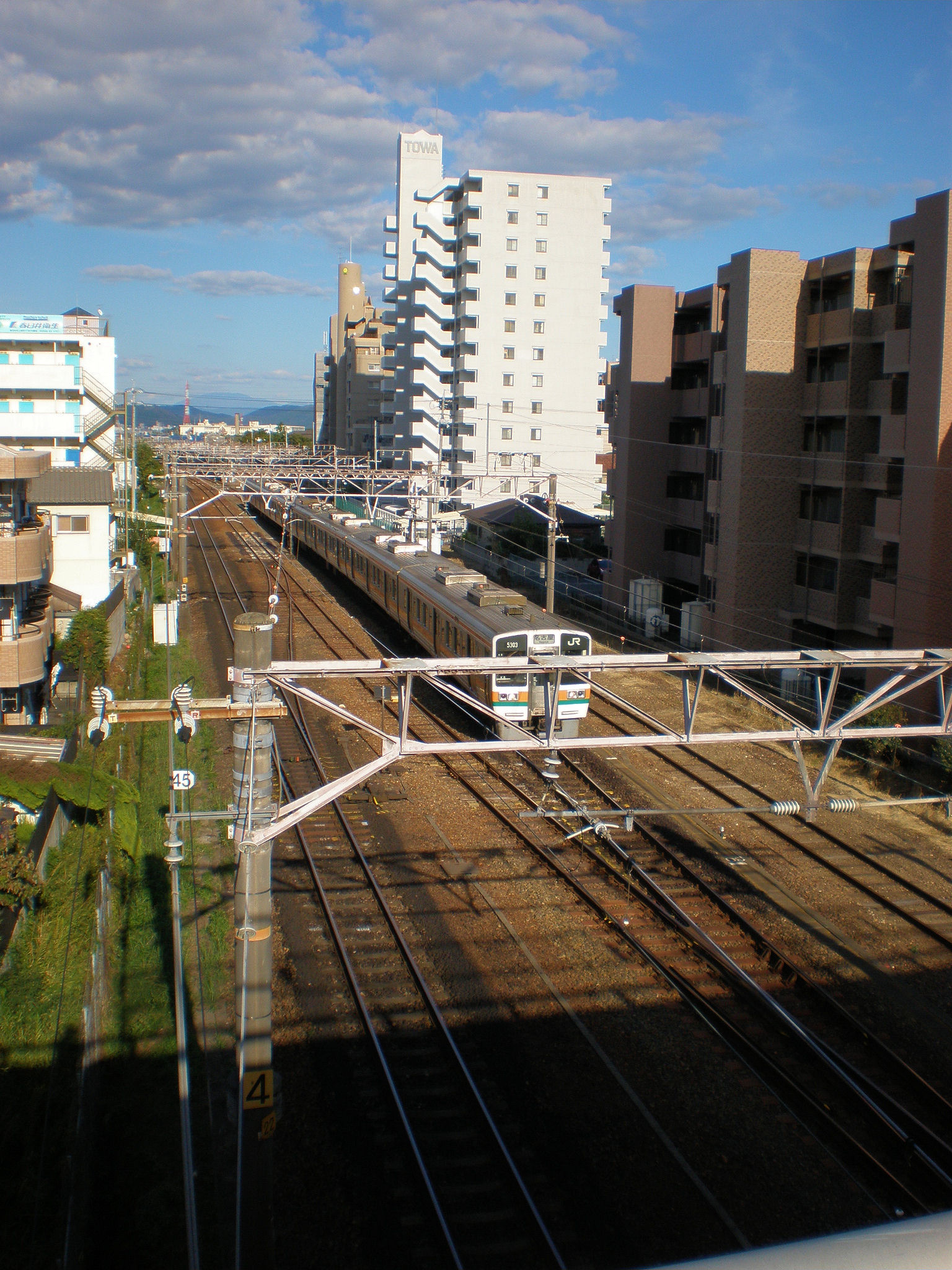 JR東海・中央本線（撮影場所：春日井市弥生町2丁目）